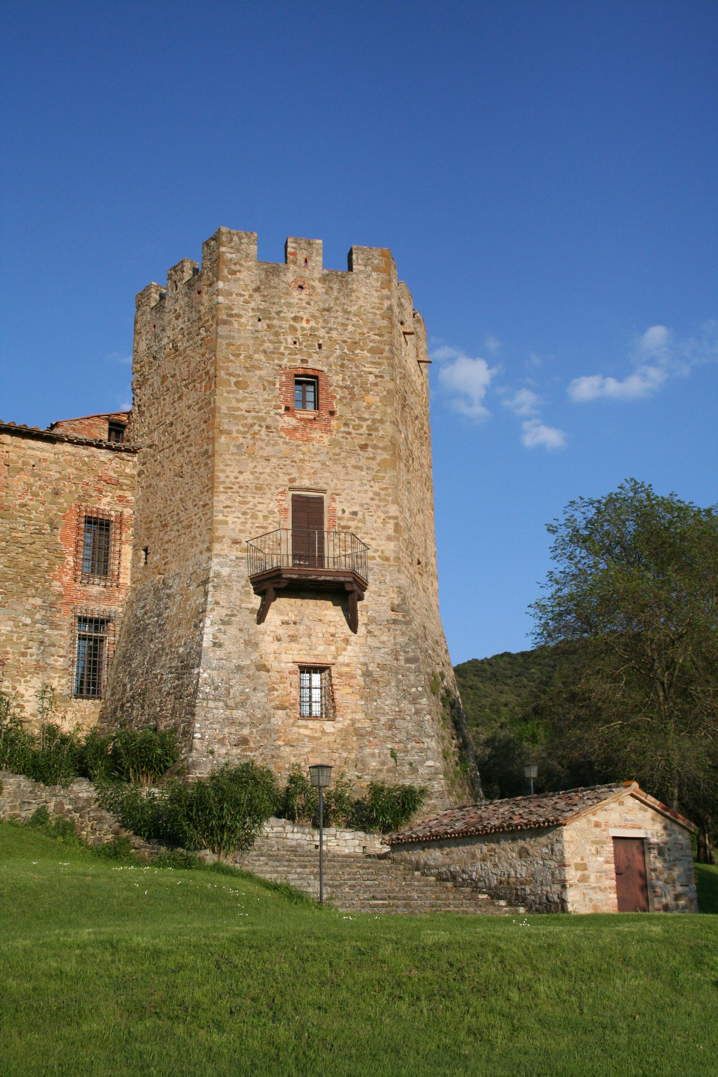 Badia di Sant Arcangelo, Turm